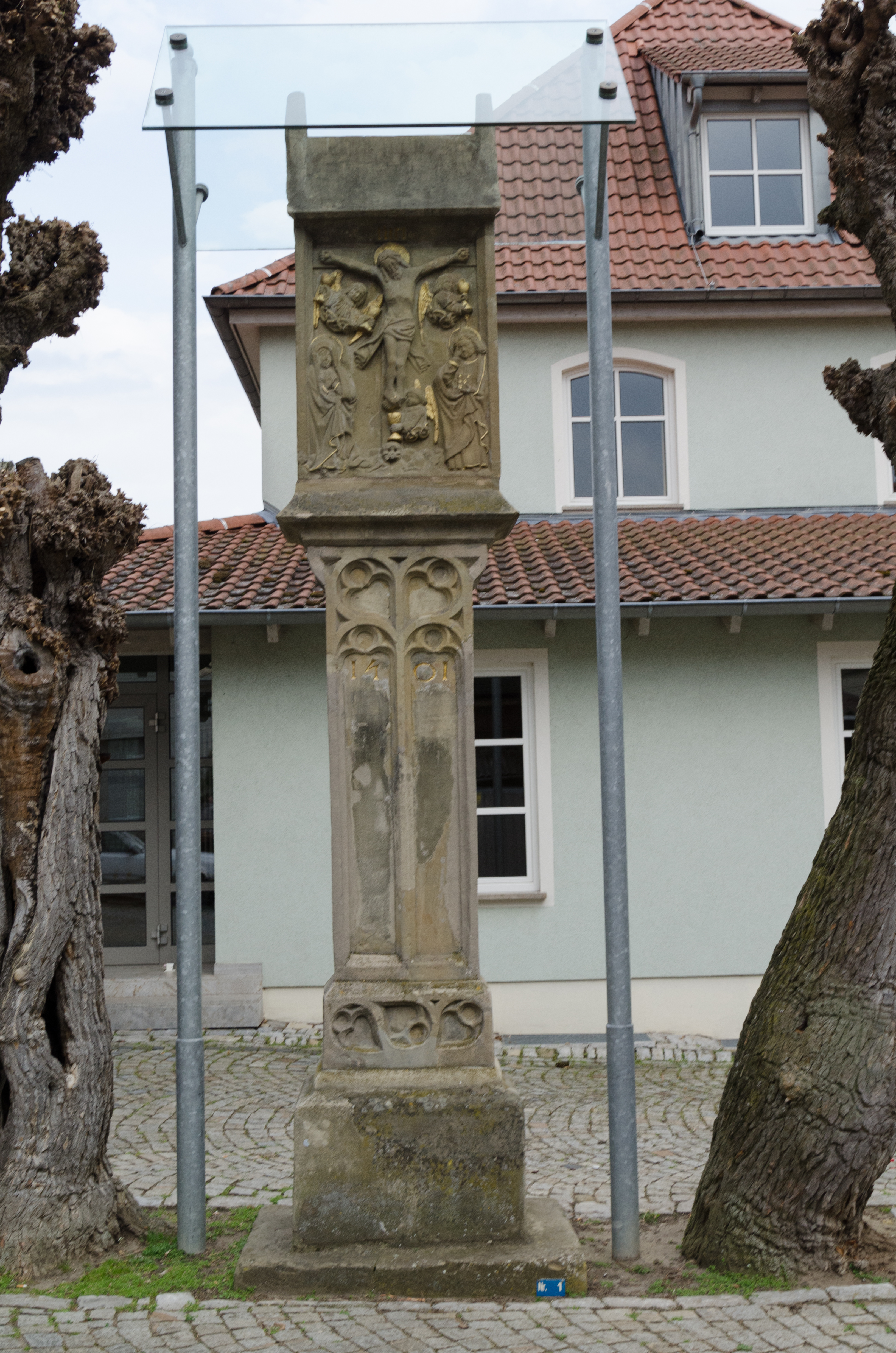 Großlangheim, Kirchplatz 5, Bildstock